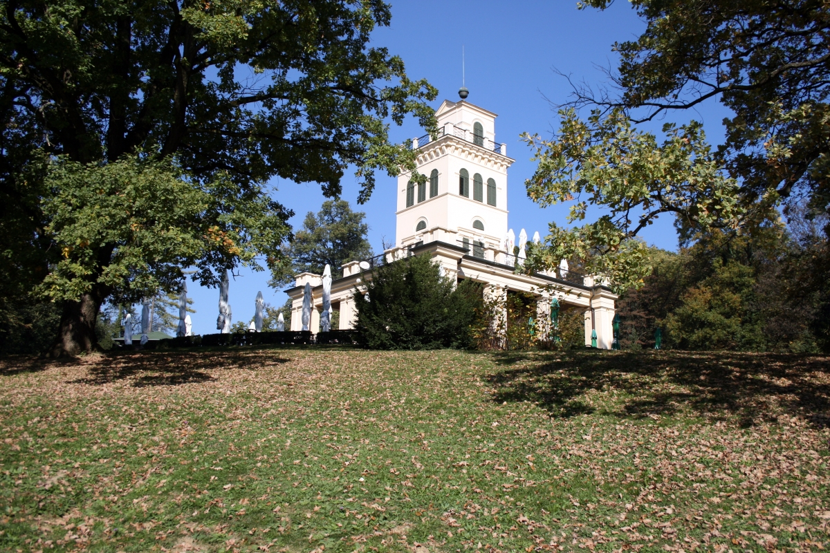 Maksimir, Zagreb